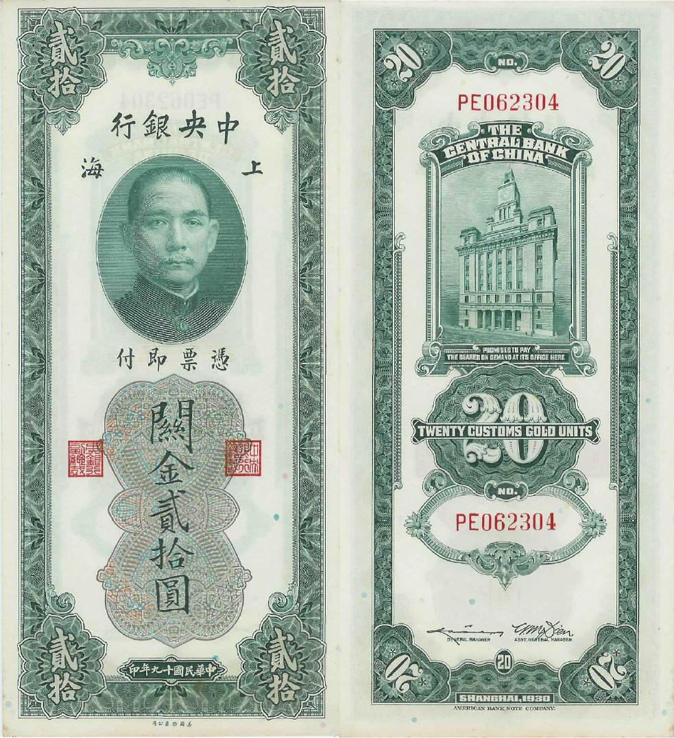 20 CGU bill